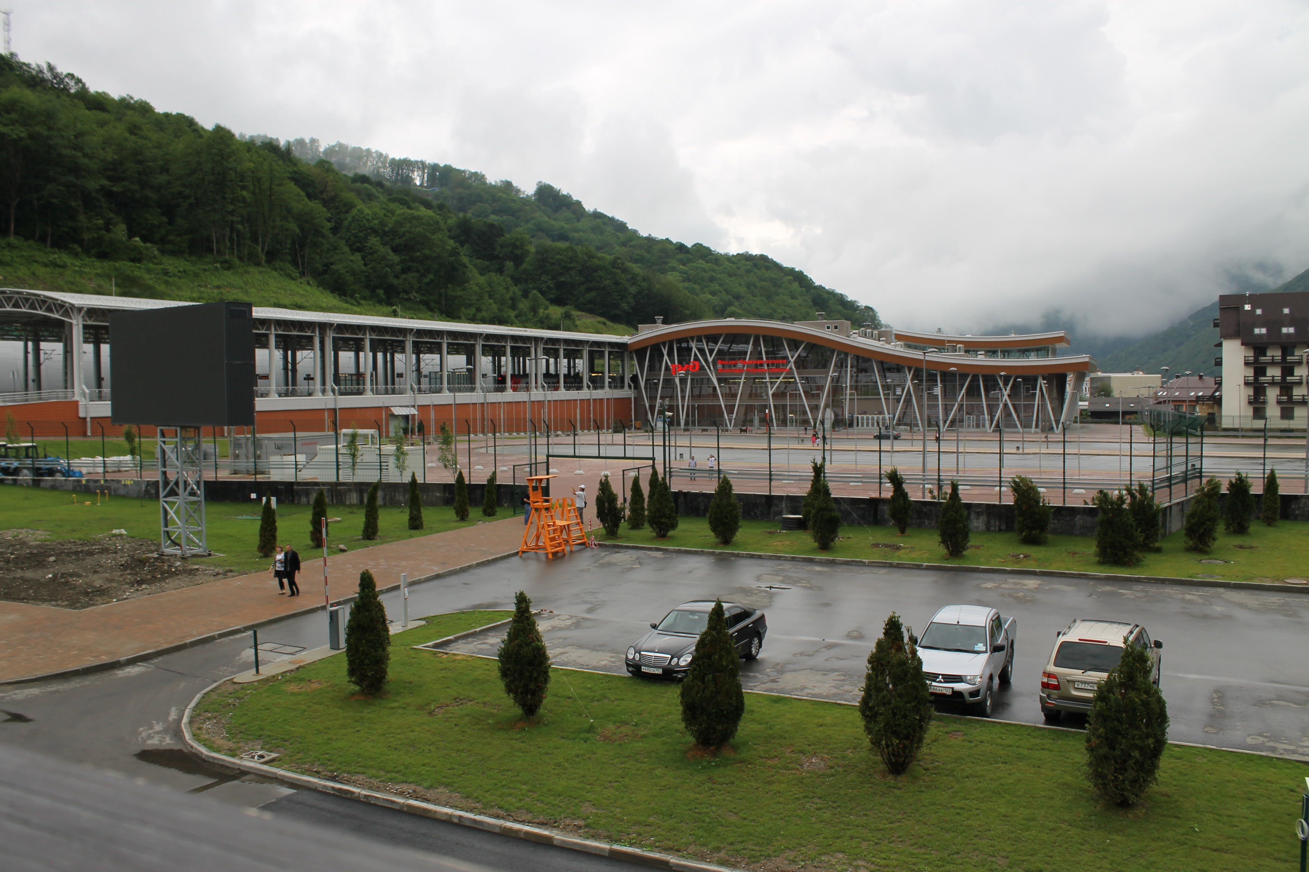 Железнодорожный вокзал Красная Поляна.